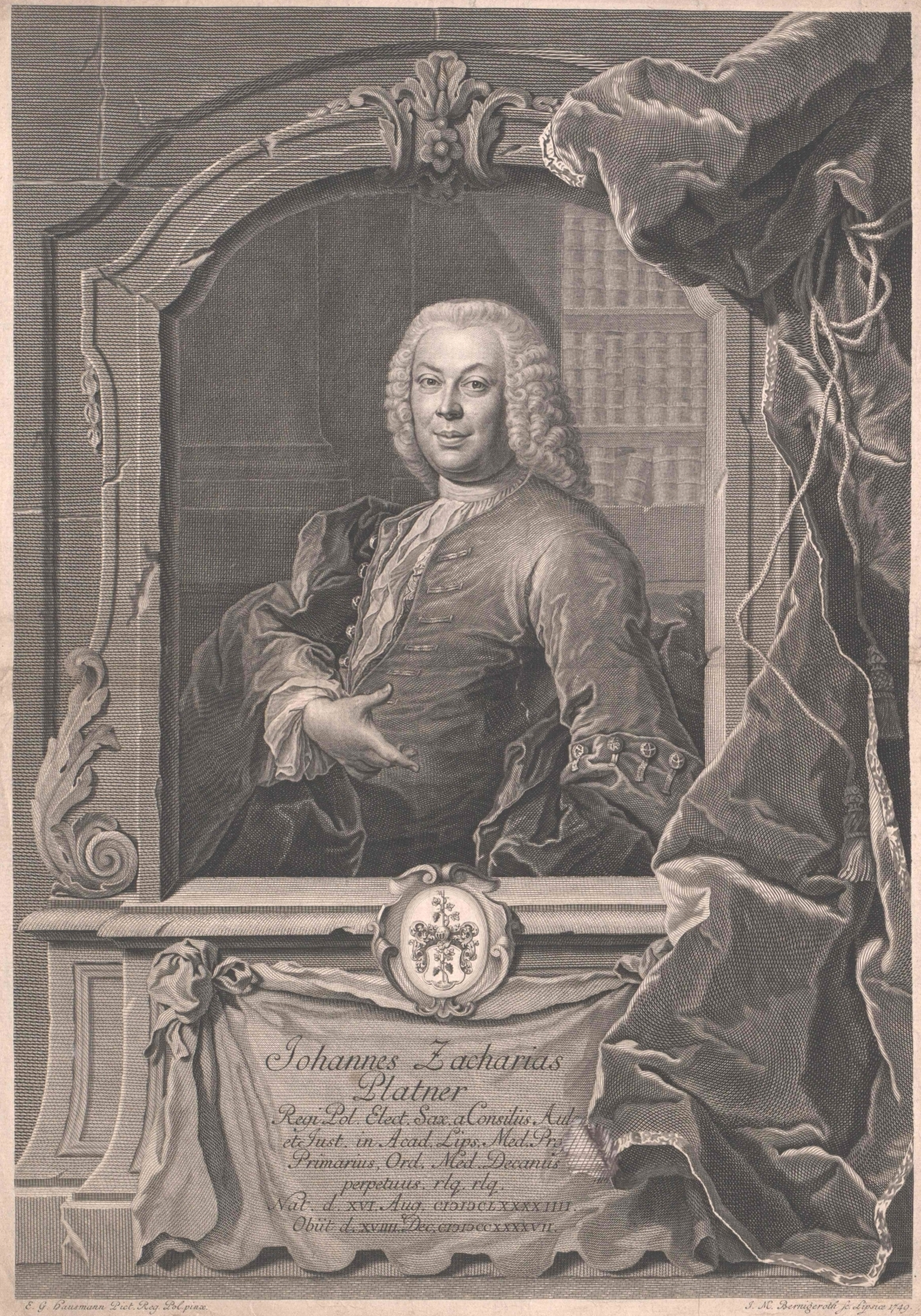 Johannes Zacharias Platner (1694–1747)